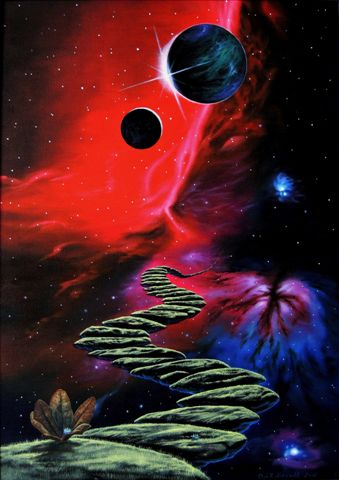 Gemälde von Gabriele L. Berndt